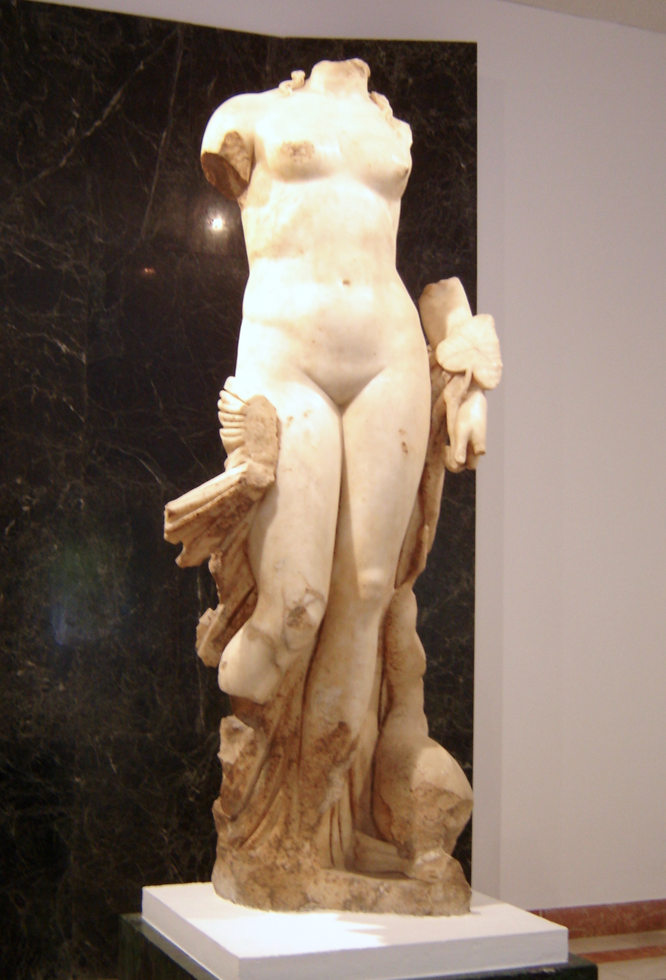 Museo Arqueológico (Plaza de América), en el Parque de María Luisa (Sevilla). Diosa Venus (año 117). Realización propia.